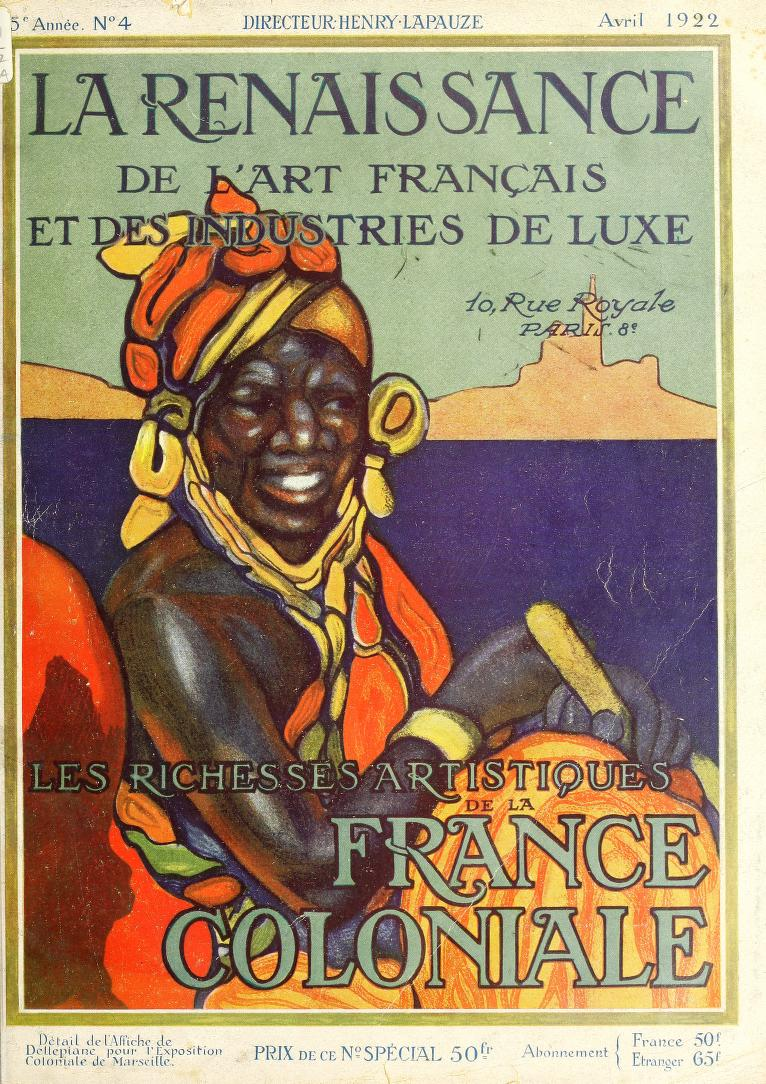 La Renaissance de l'Art Français et des Industries du Luxe. Les richesses artistiques de la France coloniale, 1922. Cover artː David Dellepiane